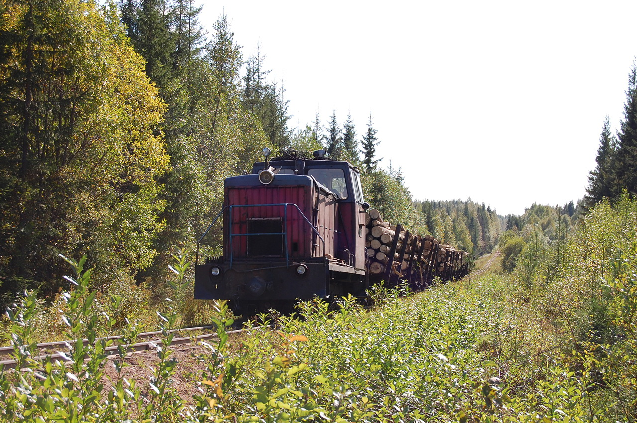 ТУ6А с грузовым поездом, Удимская УЖД